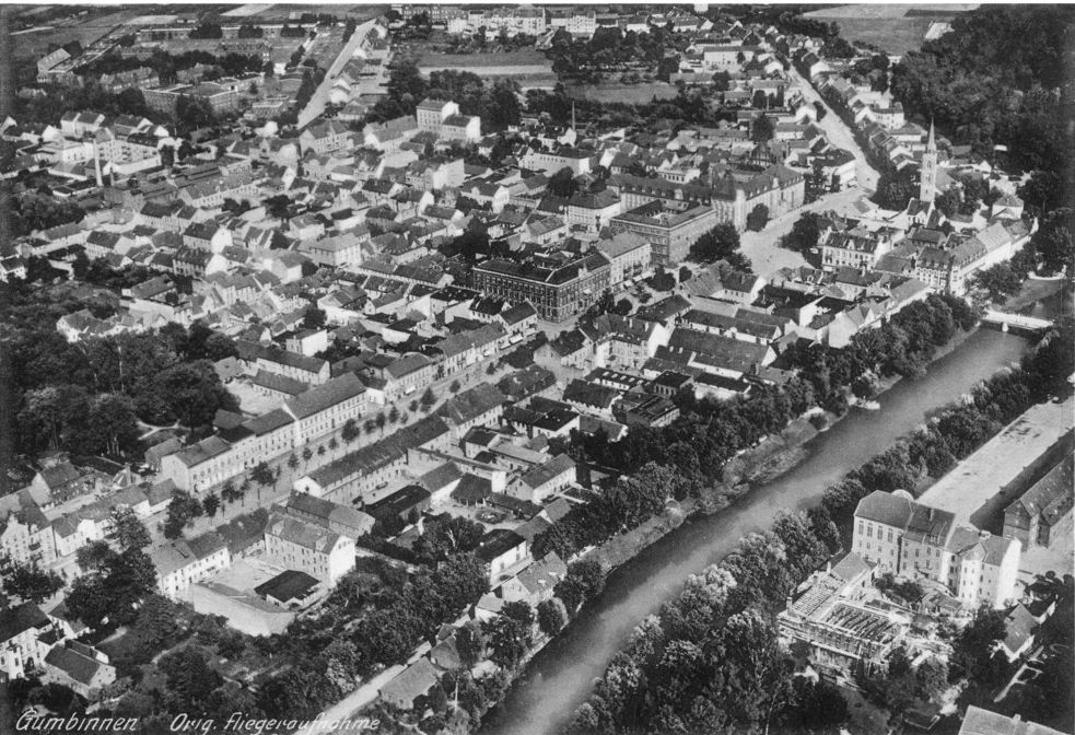 Город Gumbinnen (Гусев, Калининградская область)